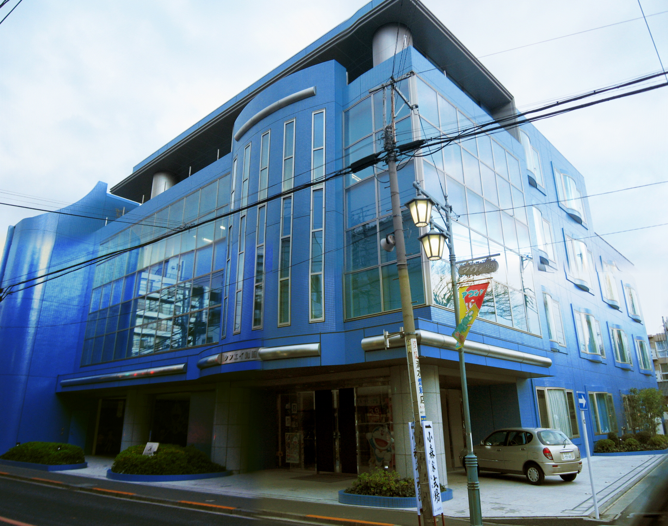 シンエイ動画本社（東京都西東京市）